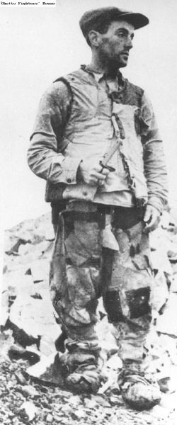 חבר תנועת החלוץ מפלוגת חוצבי האבנים בקלוסובה